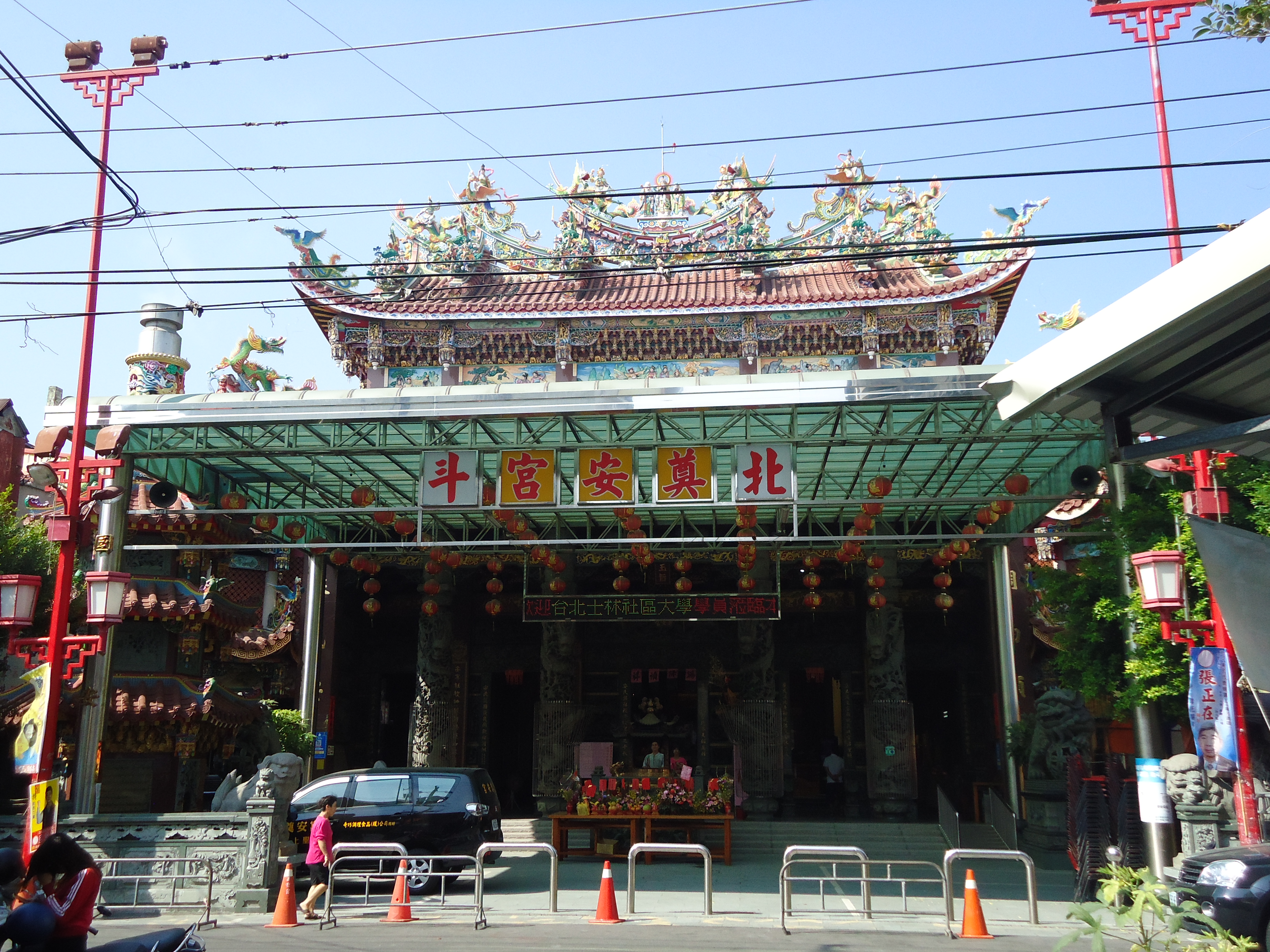 彰化北斗鎮東螺開基祖廟奠安宮為東螺之開基湄洲媽祖廟，同時也是南彰化歷史最為悠久的媽祖廟之一。